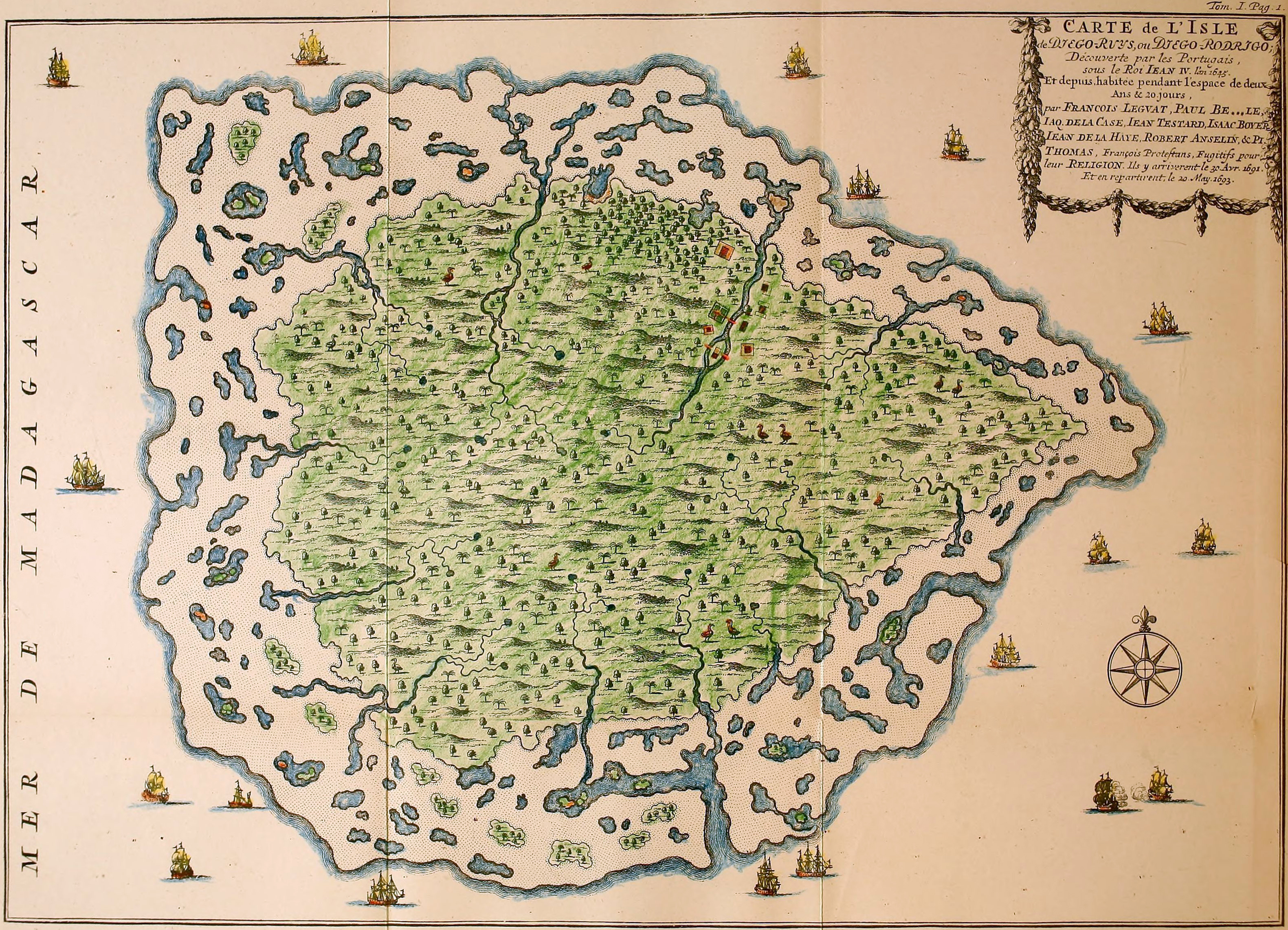 François Leguat's map of Rodrigues island, containing Rodrigues Solitaires.